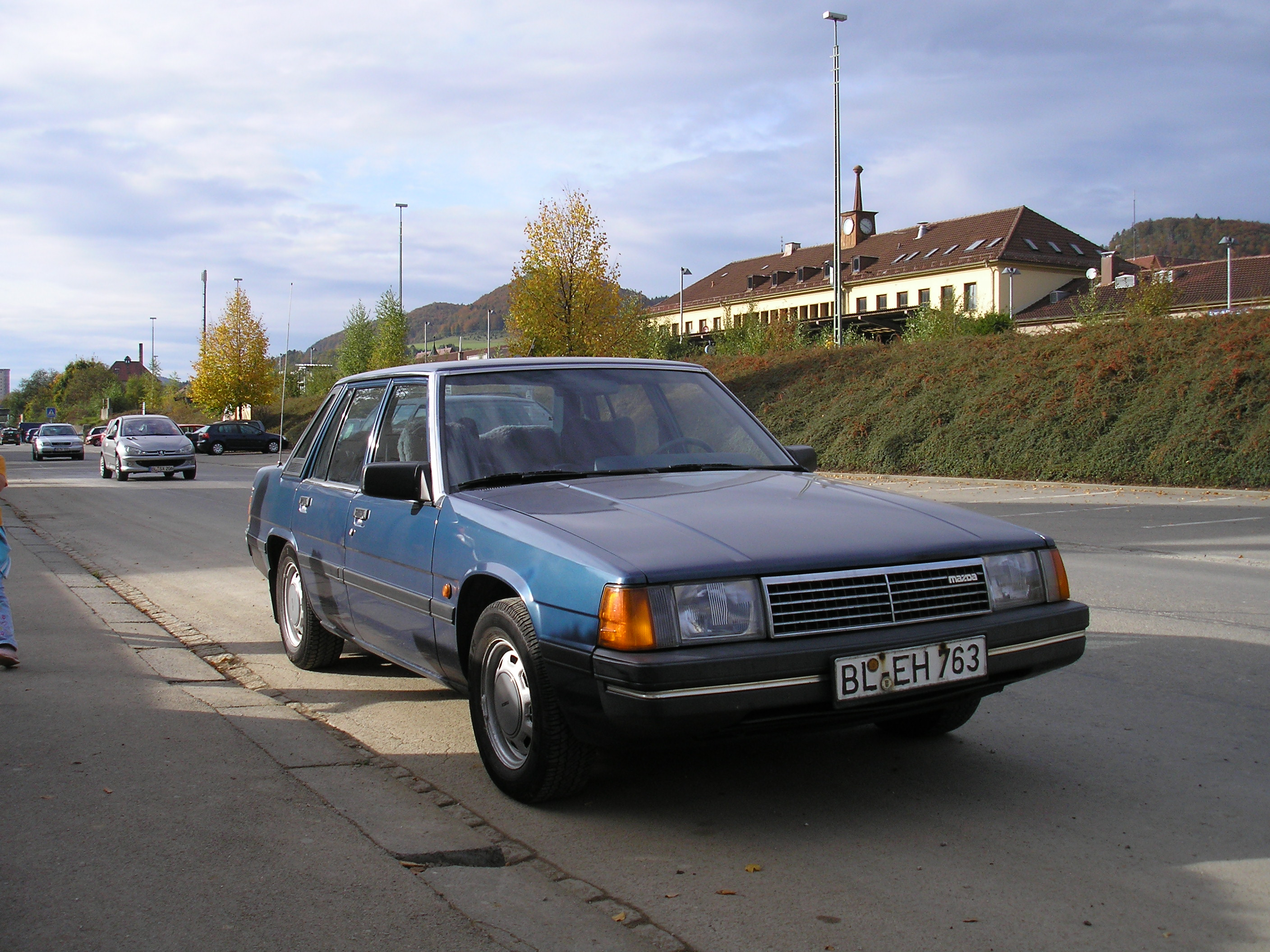 Mazda 929 1984